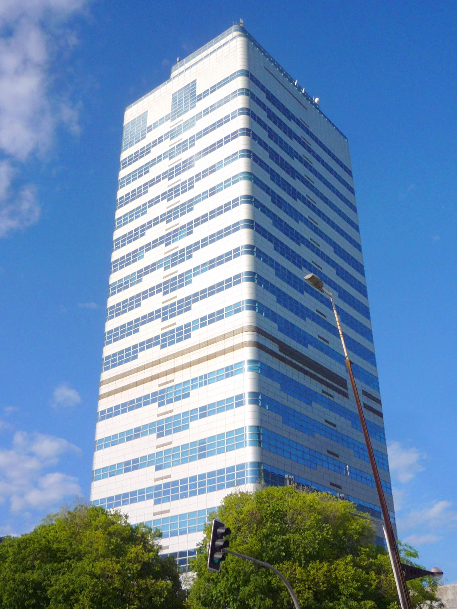 Sabadell - Avinguda de Francesc Macià, Torre Millenium